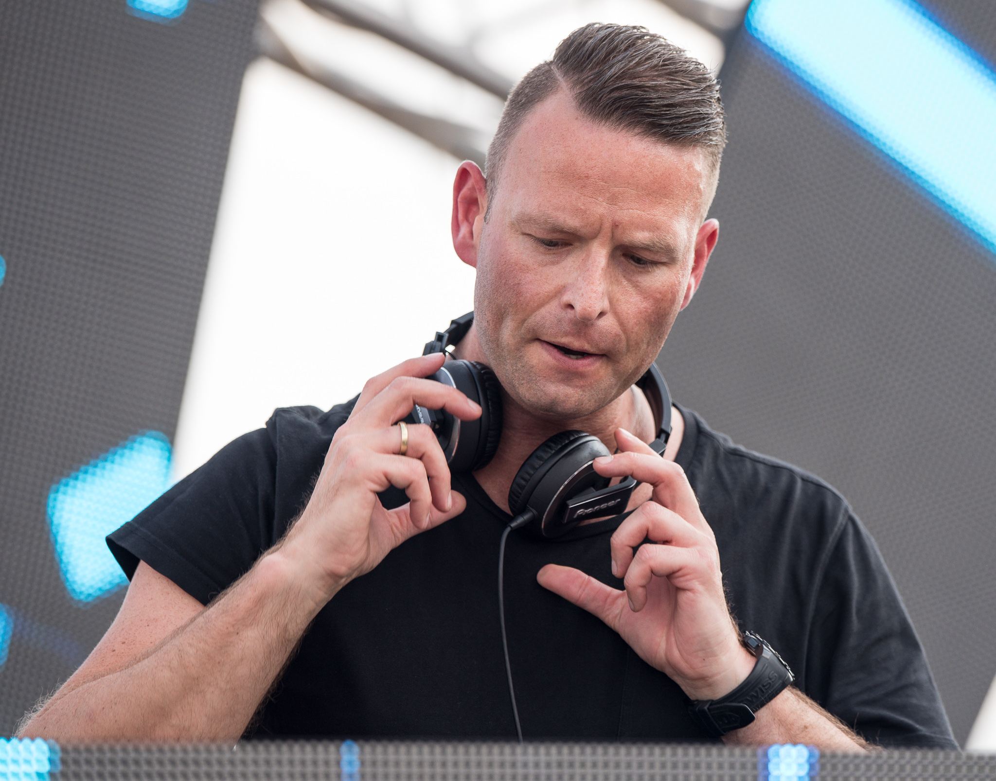 3rd Stage,Evil Activities,Festival,Kelly van Soest,Konzert,Livekonzert,Livemusik,Max Enforcer,Musik,Open Beatz 2016